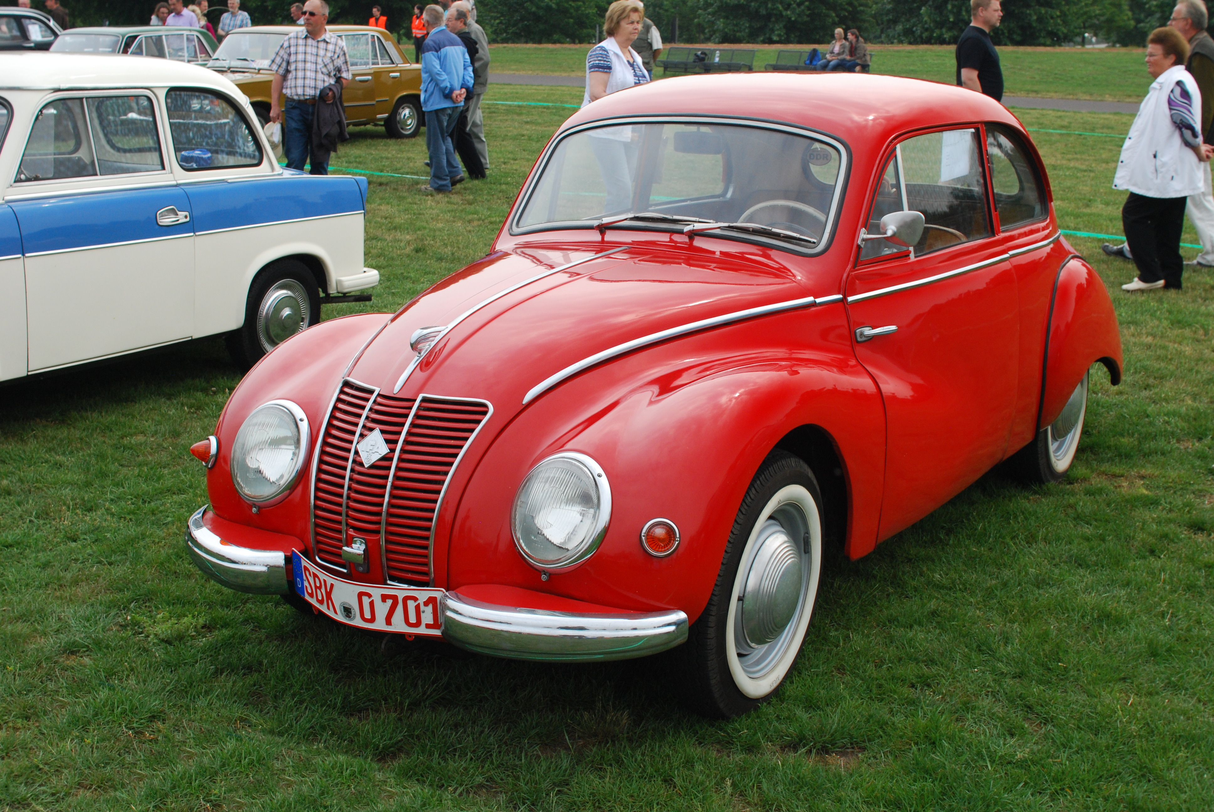 1. Magdeburger Oldtimertag am 21.05.2011 im Elbauenpark Magdeburg